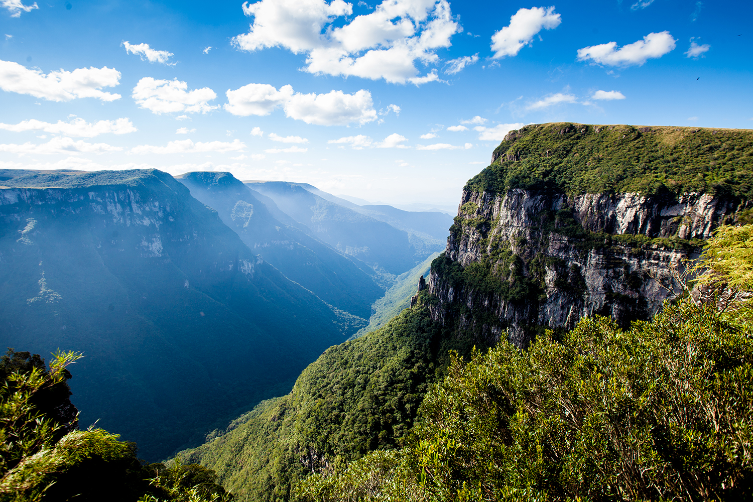 Visão geral do Canyon Fortaleza em Cambará do Sul